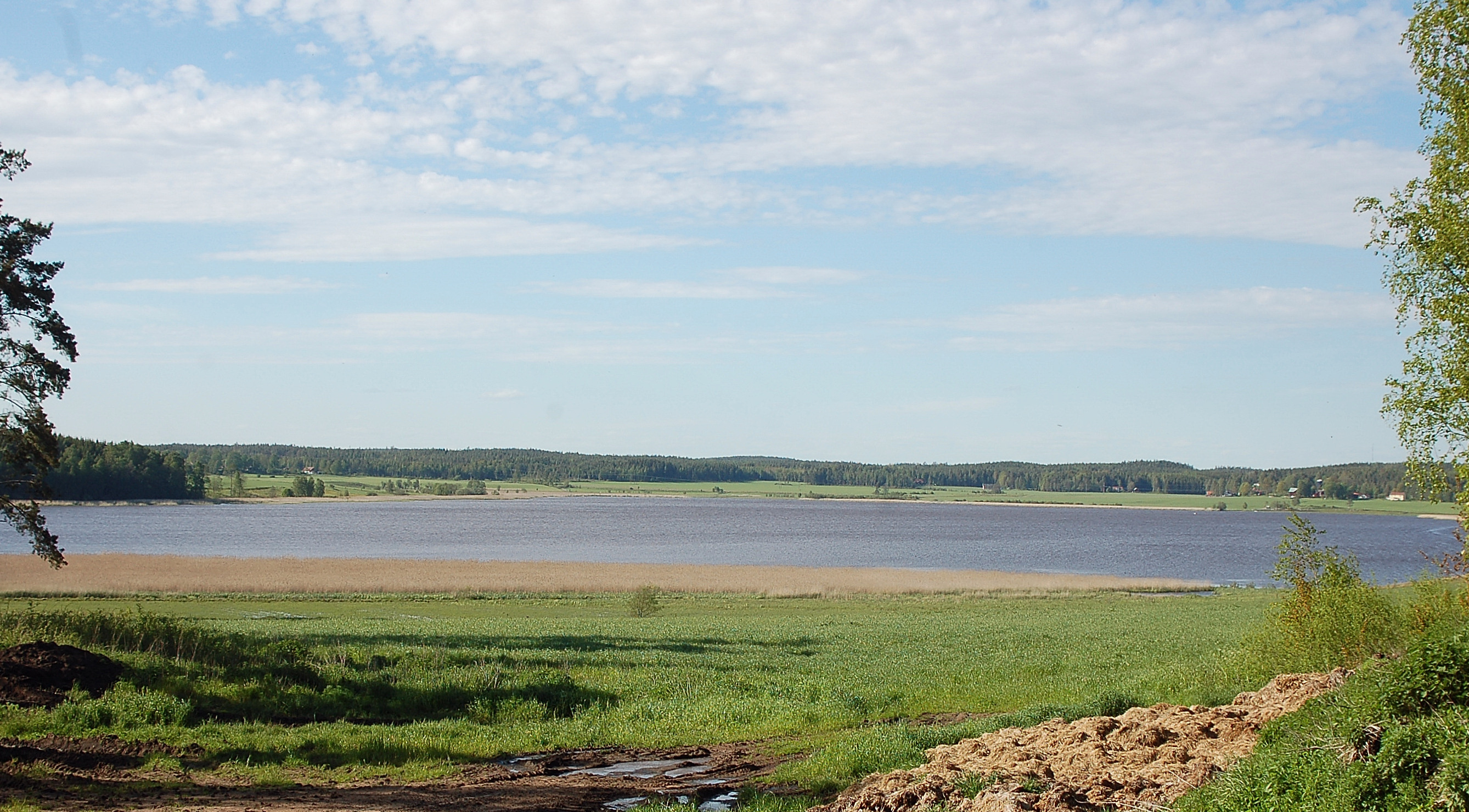 Sjön Panken från söder.